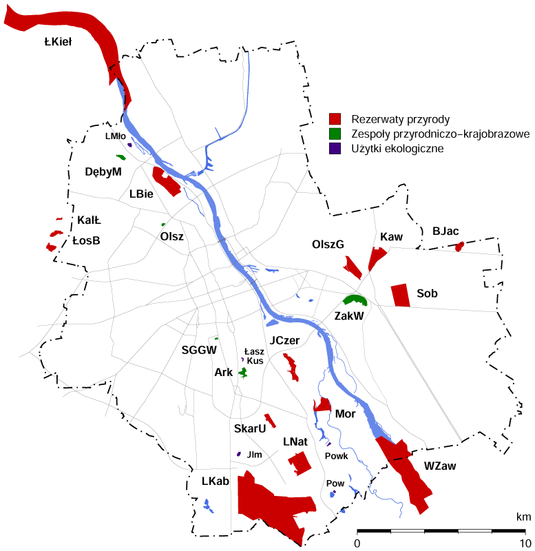 Rezerwaty przyrody, zespoły przyrodniczo-krajobrazowe i użytki ekologiczne w Warszawie oraz rezerwaty Łosiowe Błota i Kalinowa Łąka - plan (mapa). Otuliny rezerwatów nie zostały zaznaczone. Stan na lipiec 2016 roku. Zastosowane skróty: Rezerwaty przyrody BJac - Bagno Jacka JCzer - Jeziorko Czerniakowskie KalŁ - Kalinowa Łąka Kaw - Kawęczyn LBie - Las Bielański LKab - Las Kabacki im. Stefana Starzyńskiego LNat - Las Natoliński ŁKieł - Ławice Kiełpińskie ŁosB - Łosiowe Błota Mor - Morysin OlszG - Olszynka Grochowska SkarU - Skarpa Ursynowska Sob - Rezerwat im. Króla Jana Sobieskiego WZaw - Wyspy Zawadowskie Zespoły przyrodniczo-krajobrazowe Ark - Arkadia DębyM - Dęby Młocińskie Olsz - Olszyna SGGW - Park SGGW ZakW - Zakole Wawerskie Użytki ekologiczne JIm - Jeziorko Imielińskie - użytek 623 Kus - Janusza Kusocińskiego - użytek 625 LMło - Przy Lesie Młocińskim - użytek 620 Łasz - Czesława Łaszka - użytek 624 Pow - Powsin - użytek 621 Powk - Powsinek - użytek 622 Powyższe zkróty zostały utworzone na potrzeby tej mapki, nie są to skróty oficjalne. Zasadnicza część mapki wykonana przy pomocy programu GMT 5.1.2